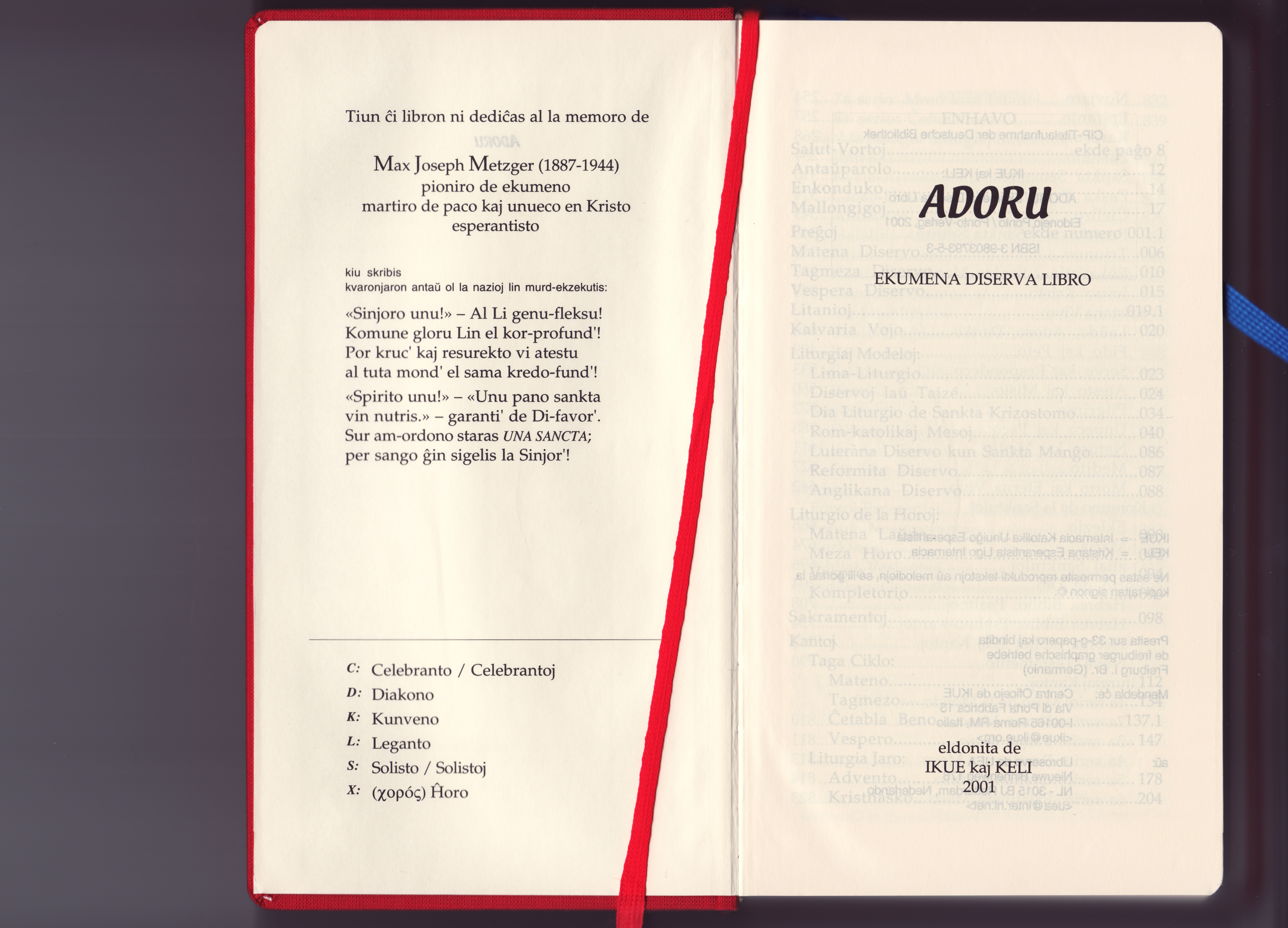 ADORU – Ökumenisches Gottesdienstbuch, das offizielle Gesangbuch der Katholischen und Evangelischen Esperanto-Vereinigung: Titelblatt.